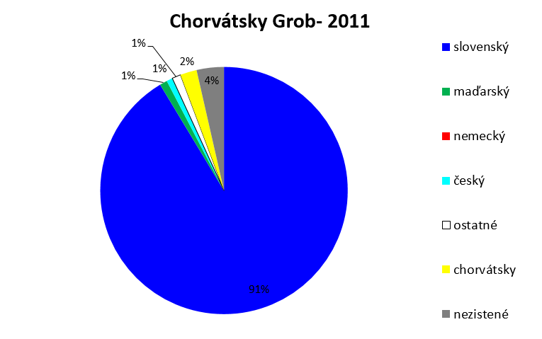 materinský jazyk